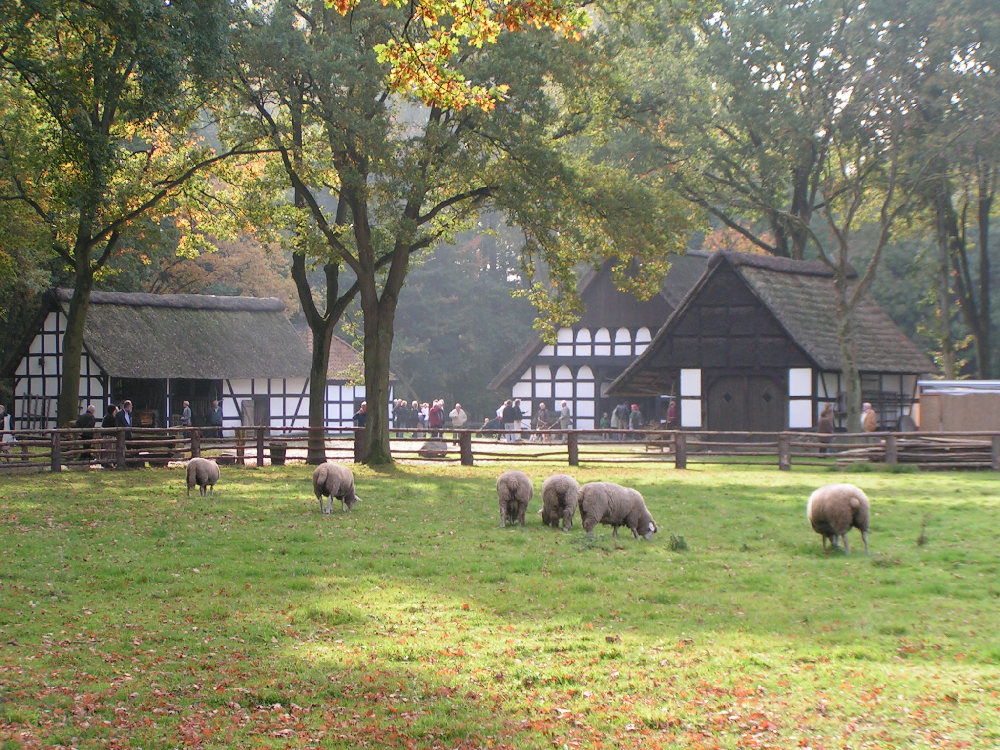 Museumshof Rahden - Gesamtansicht